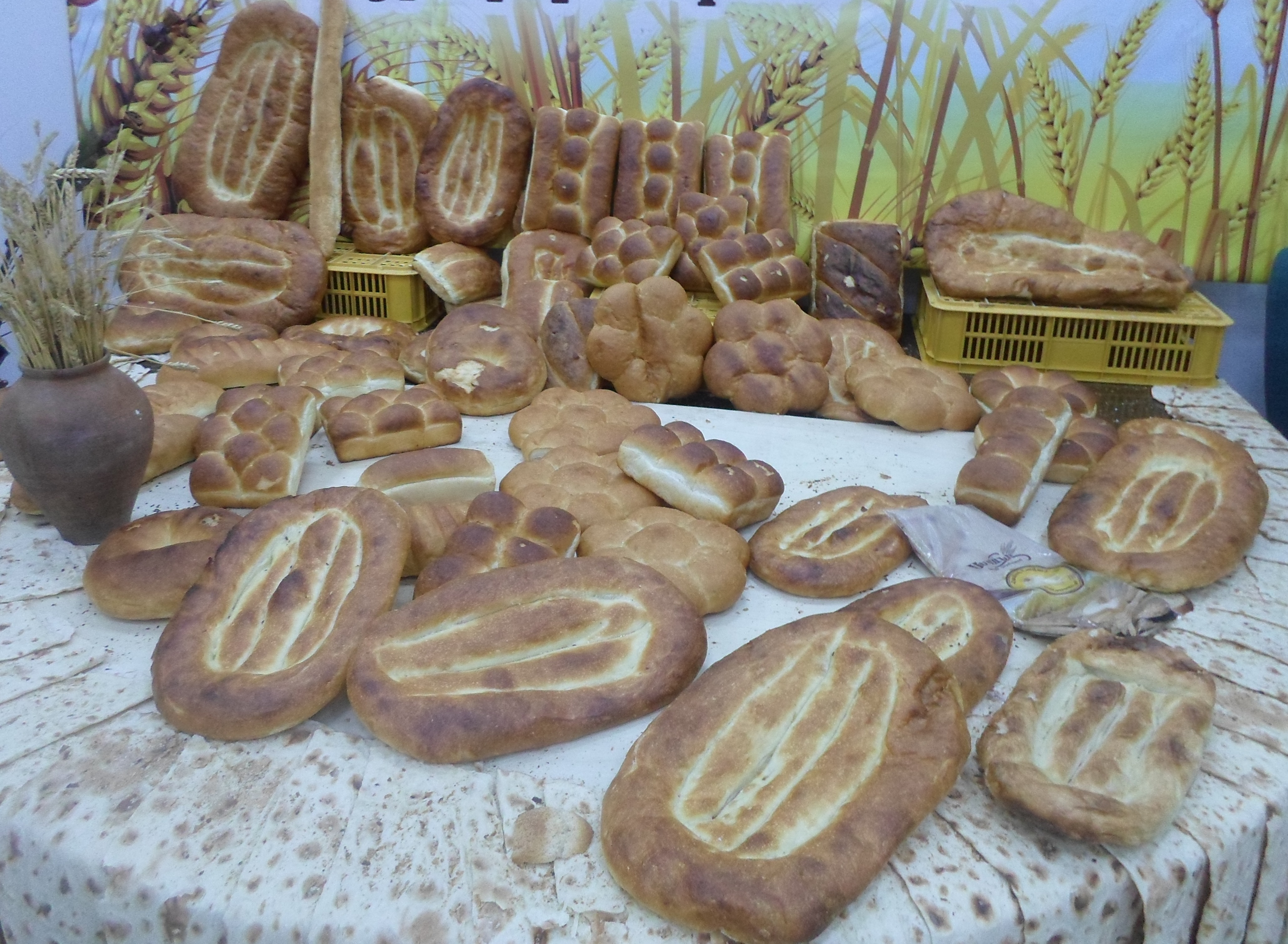 «ArmProd EXPO 2014», хлеб